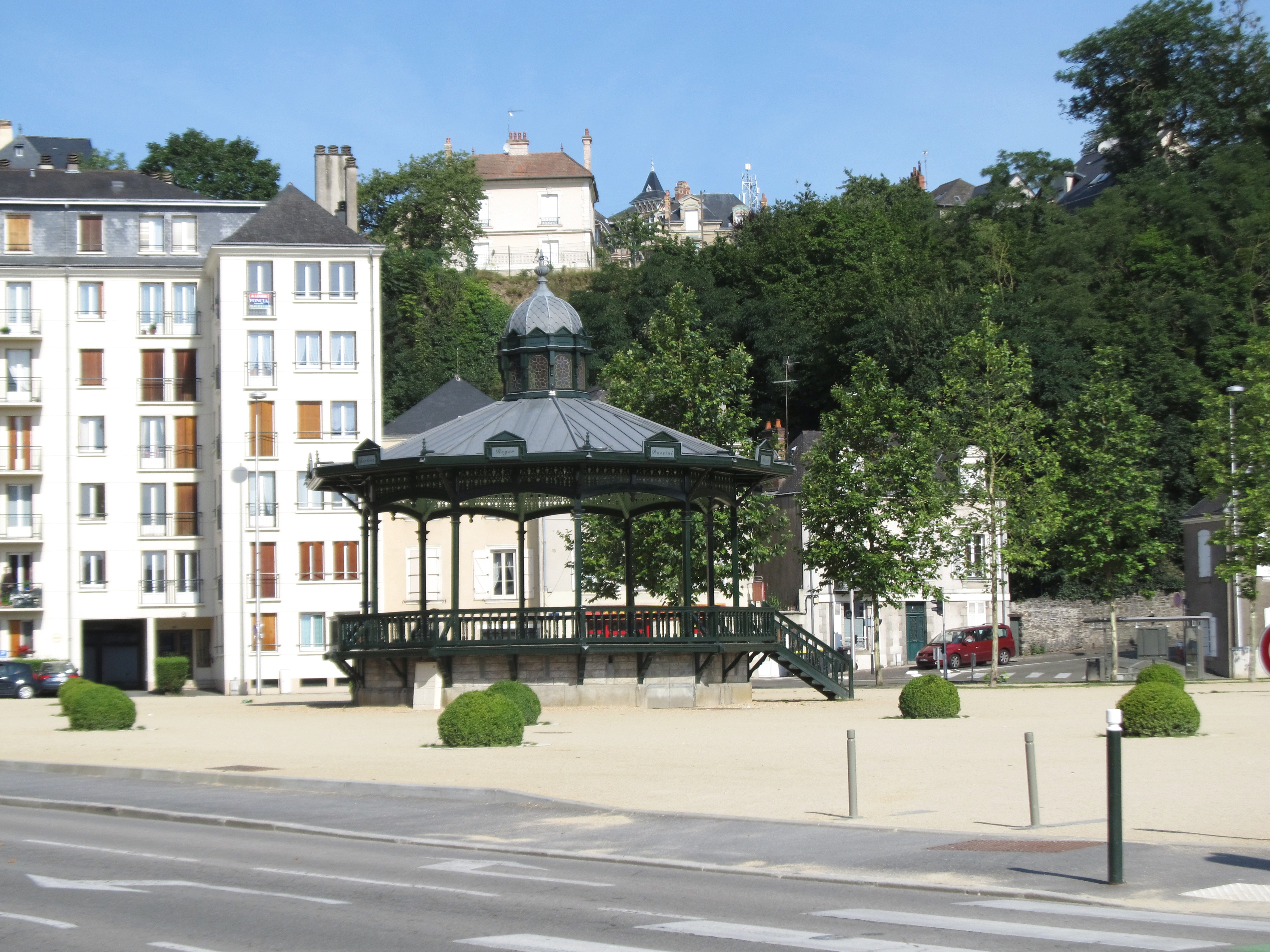 Square de Boston, Laval, Mayenne, France